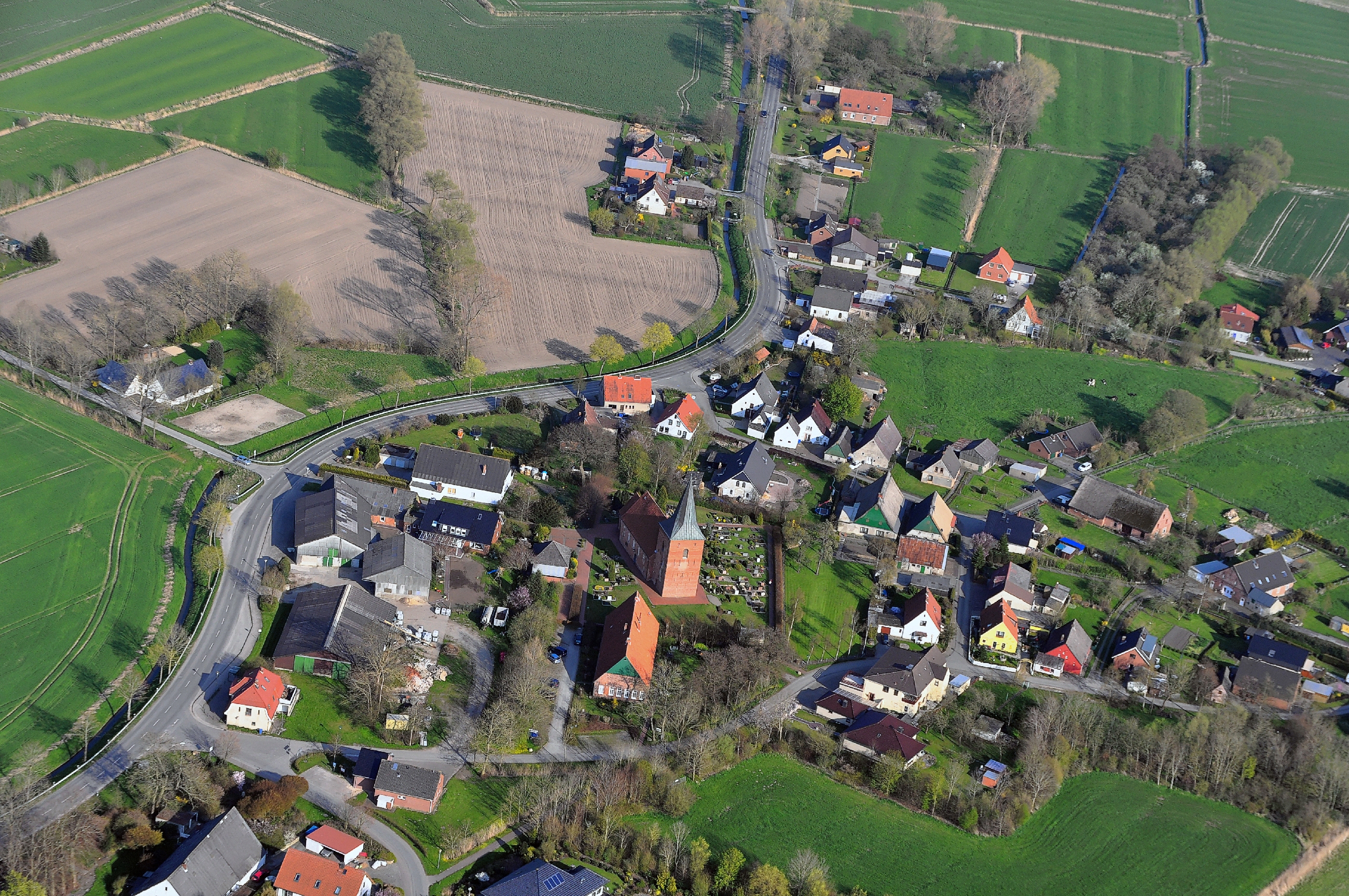 Luftbilder von der Nordseeküste 2013-05